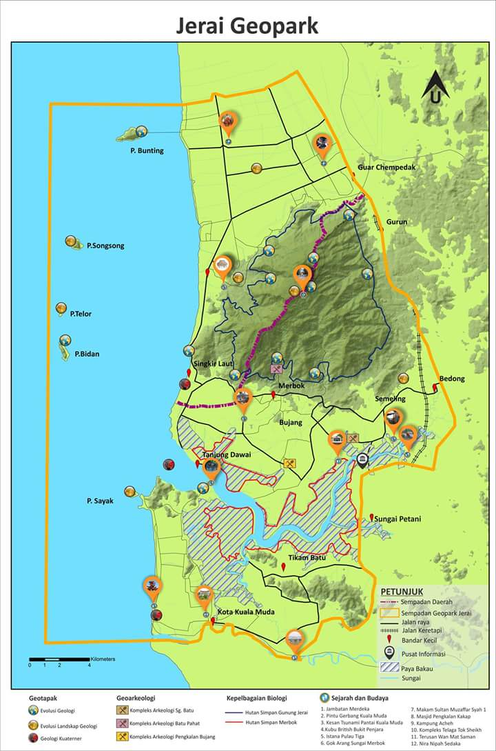 Peta lokasi Jerai Geopark